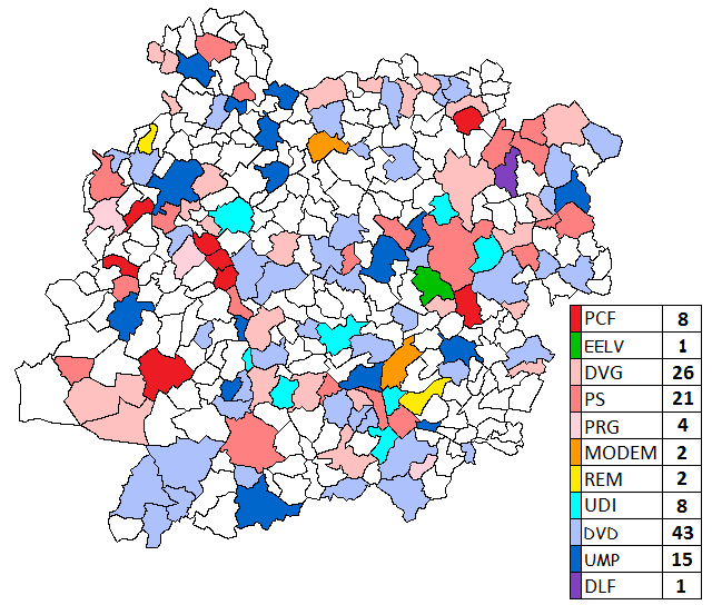 Arpetan: Étiquette des maires des communes de Lot-et-Garonne